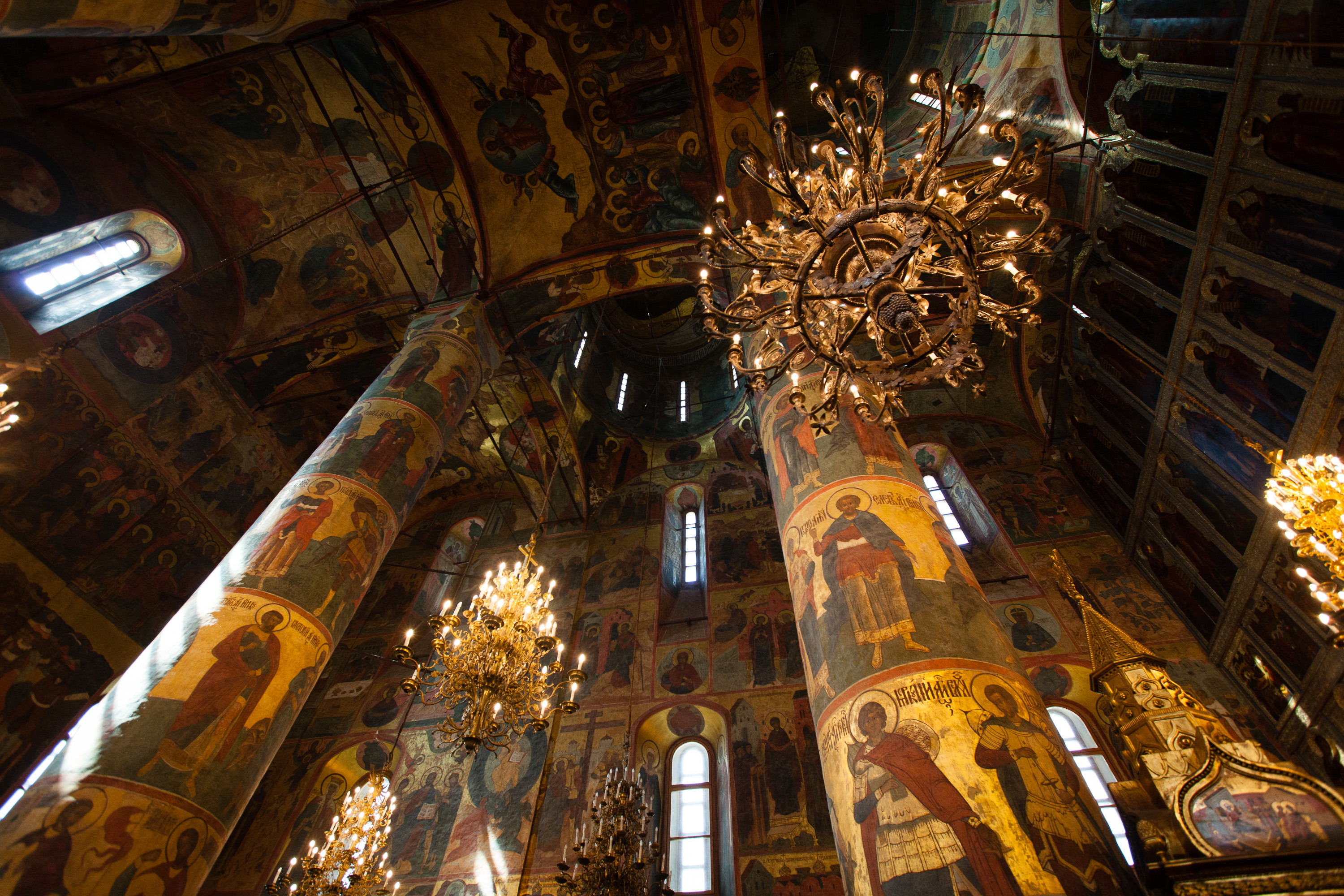 Moscow